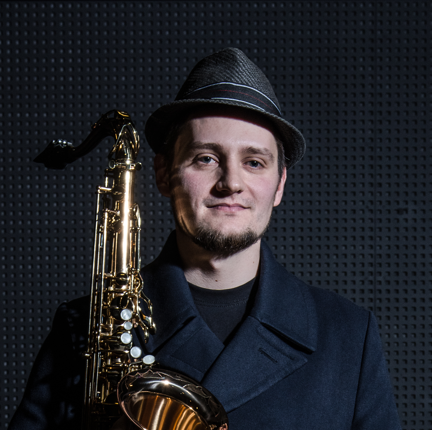 Tomasz Licak - saksofoninsta, kompozytor